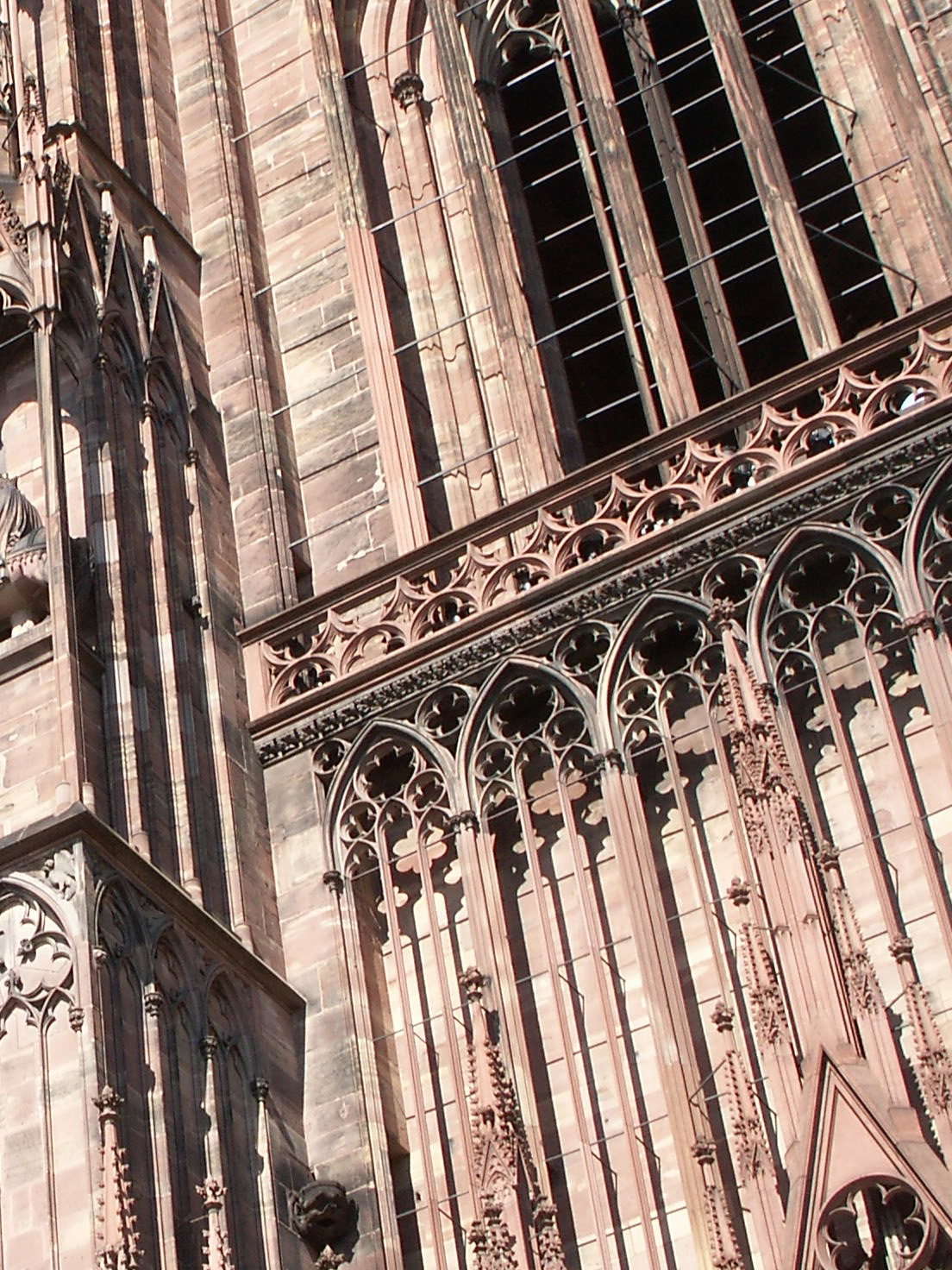 Cathédrale Notre-Dame de Strasbourg, Fassade, Detail: Harfenmaßwerk